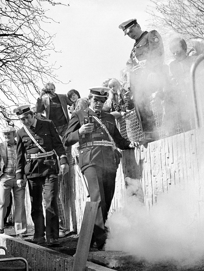 En Polis släcker en rökbomb som kastades under 1 maj talet i Malmö Folkets park 1985.